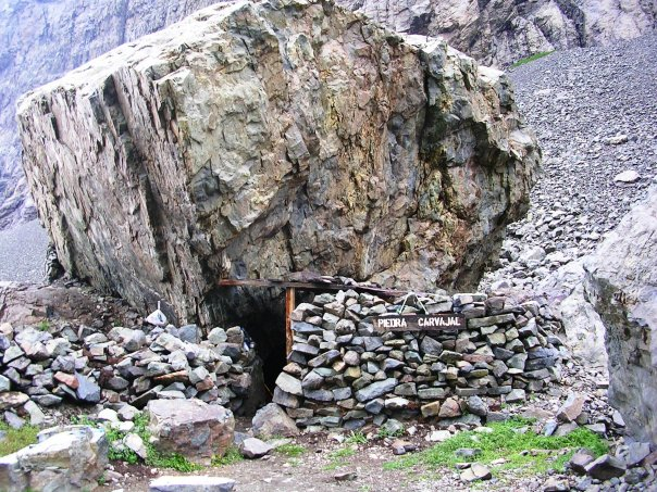 Casa Piedra cuyas primeras ocupaciones fueron en el periodo agroalfarero temprano